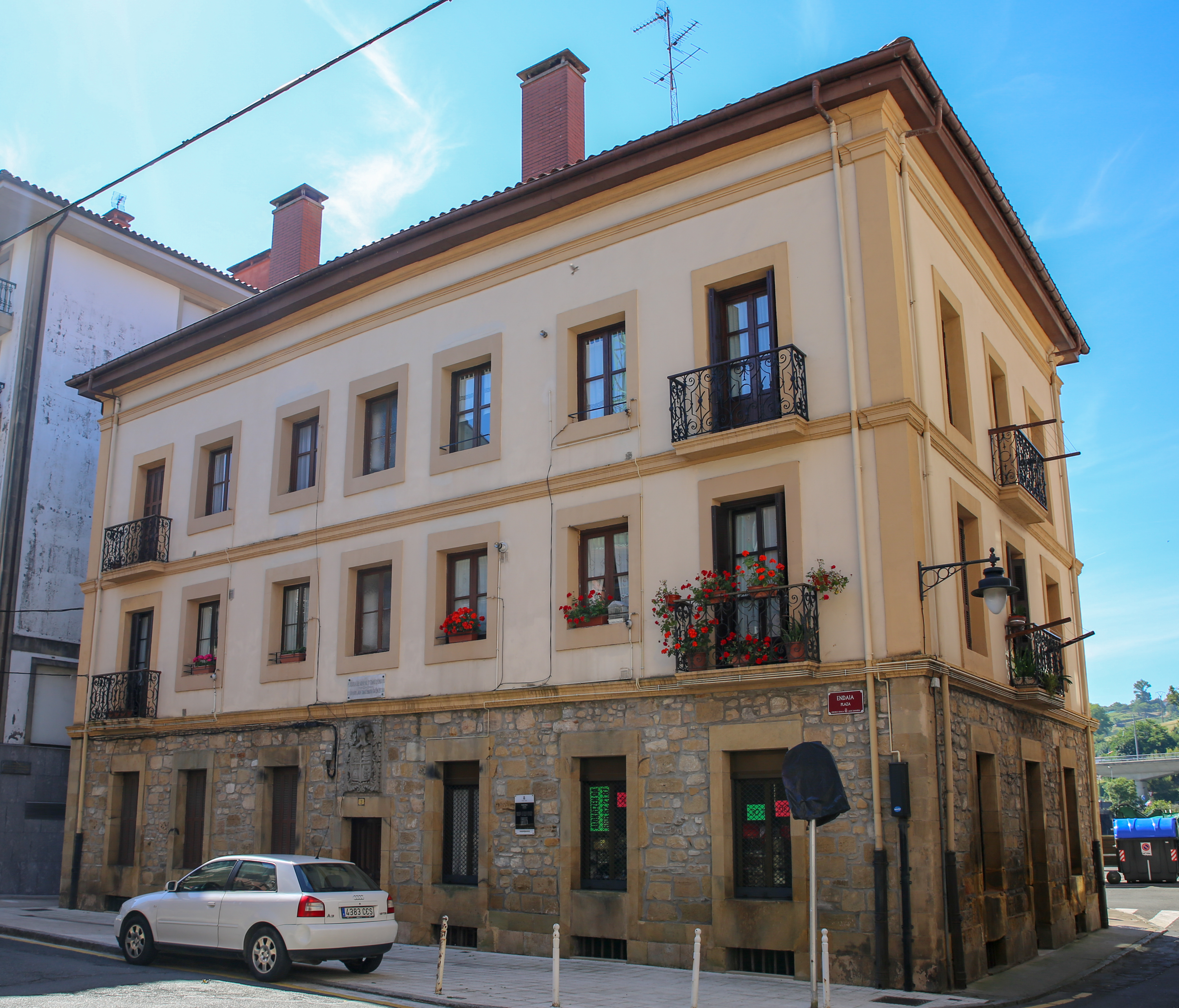 Casco Histórico de Orio, Endaia etxea, en Endaia plaza, 15-17